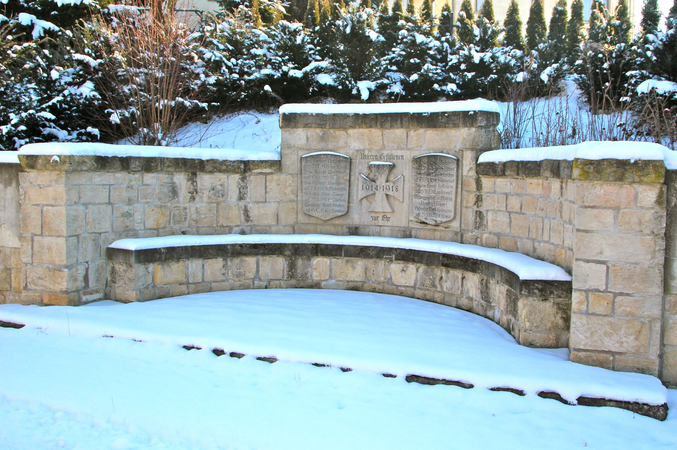 Niedermöllern ist ein Ortsteil der Gemeinde Lanitz-Hassel-Tal im Burgenlandkreis in Sachsen-Anhalt.